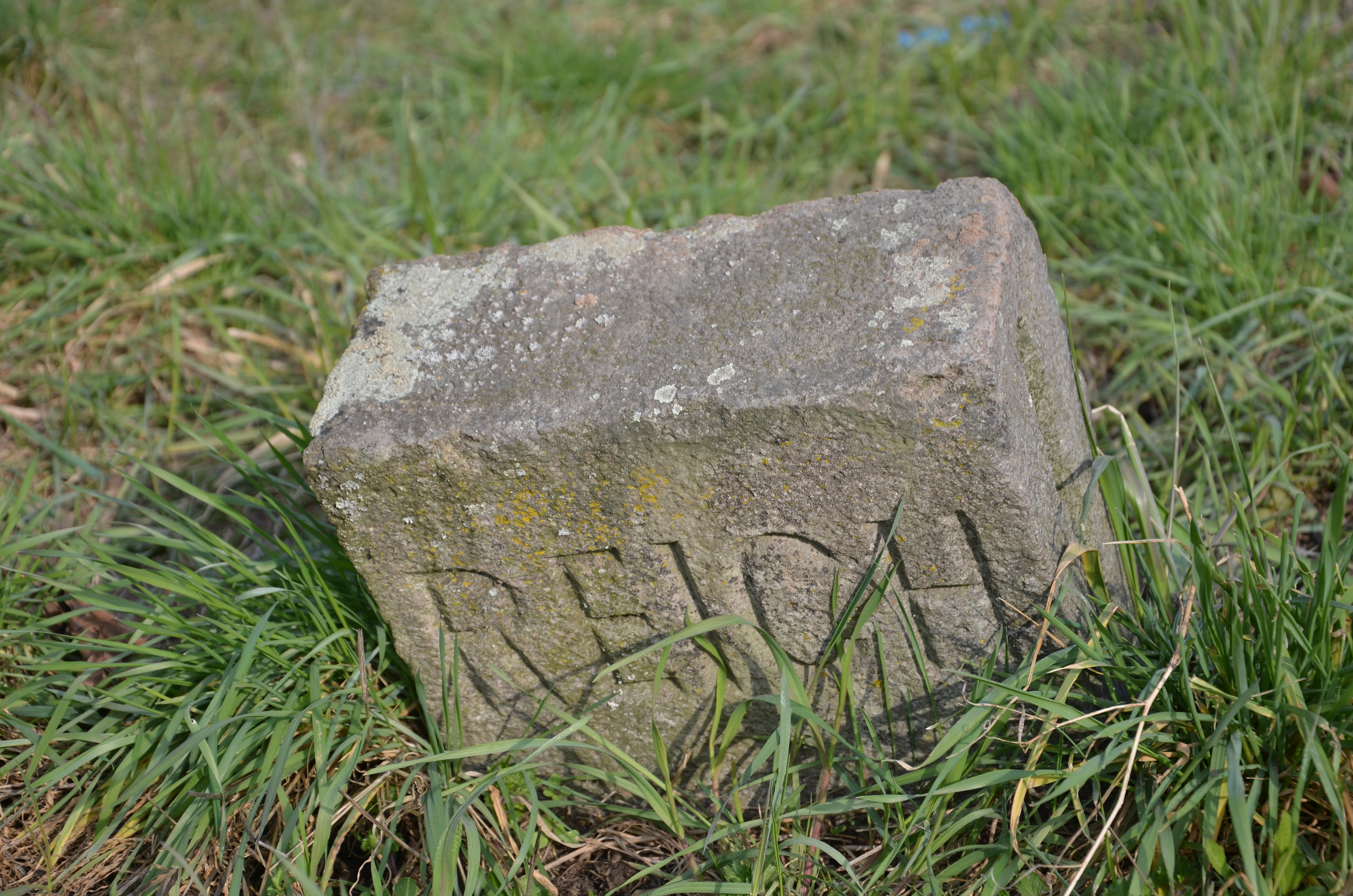 Markierungsstein zur Abgrenzung der Zuständigkeitsbereiche für die Straßenbaulast zwischen Reich und Kommune an der Söhnleinstraße, vermutlich aus dem Jahr 1935